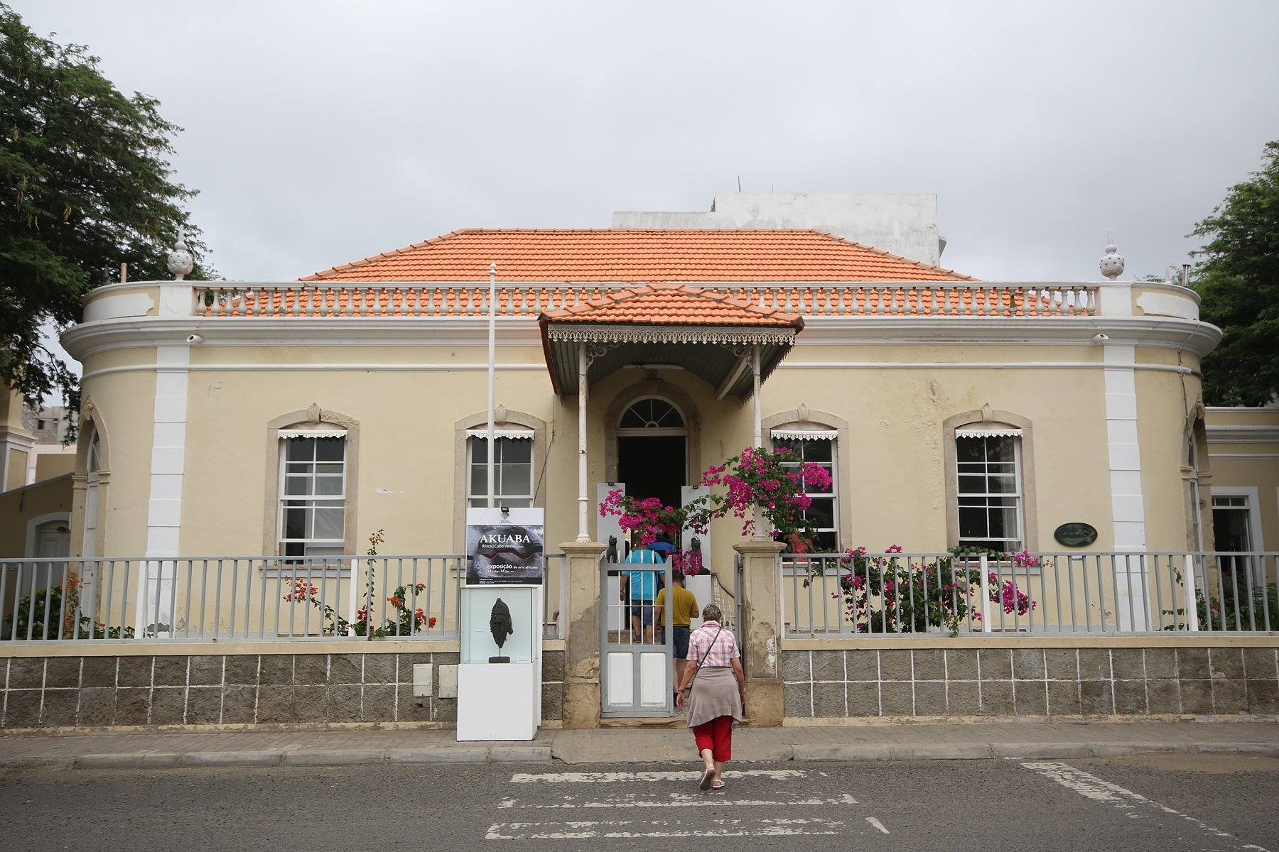 Eingangsseite des Museums Centro Nacional de Artesanato in Mindelo (Kapverden) vom Platz Amílcar Cabral aus.